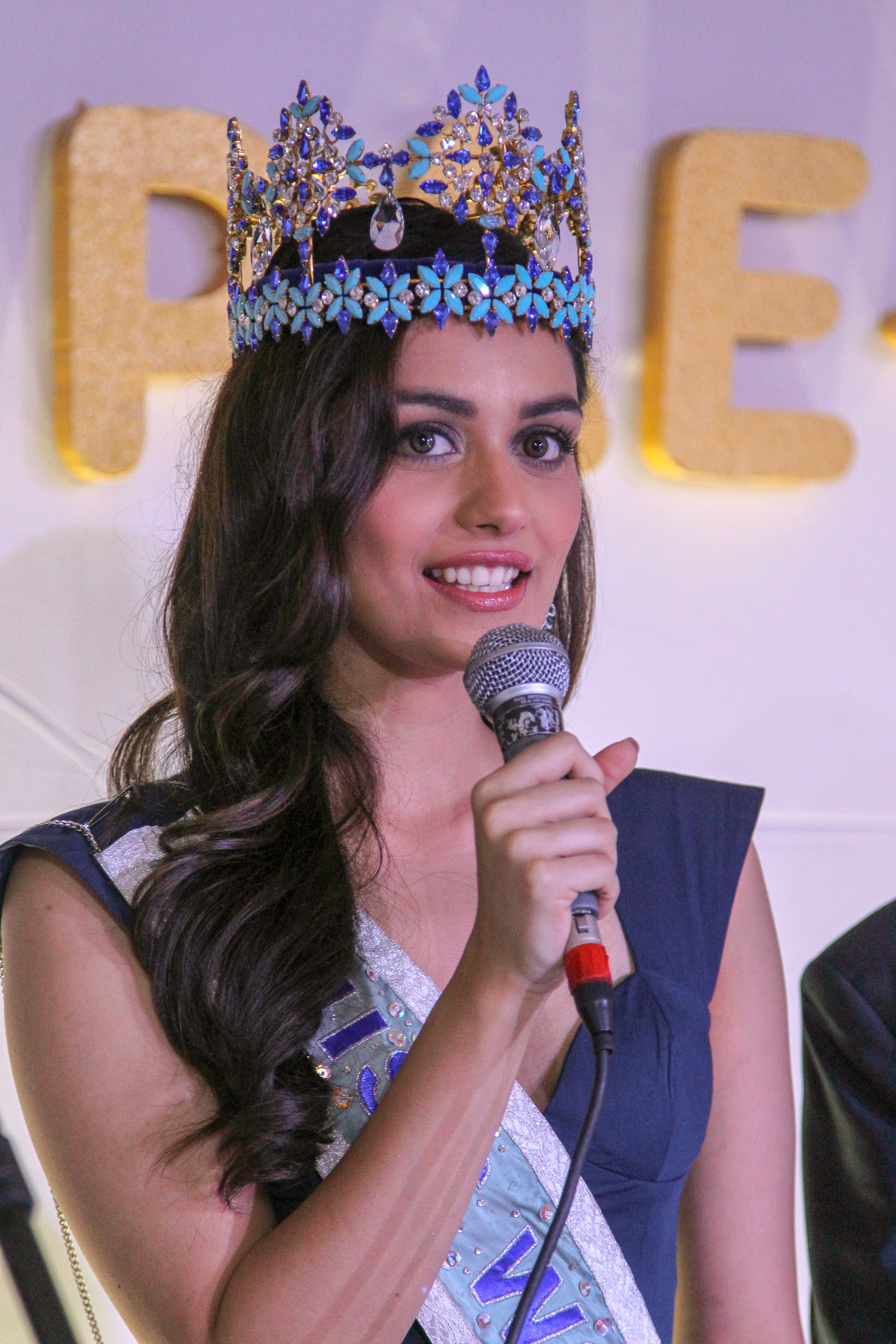 Hípica Hall, Brasília, DF, Brasil 18/4/2018 Foto: Toninho Tavares/Agência Brasília. A terceira edição do Corações Vips, noite solidária da Associação de Pais e Amigos dos Excepcionais do Distrito Federal (Apae-DF), ocorreu nesta quarta-feira (18). O governador de Brasília, Rodrigo Rollemberg, acompanhado da esposa, Márcia Rollemberg, prestigiou o evento. Um dos destaques da noite foi a presença da Miss Mundo, a indiana Manushi Chhillar.